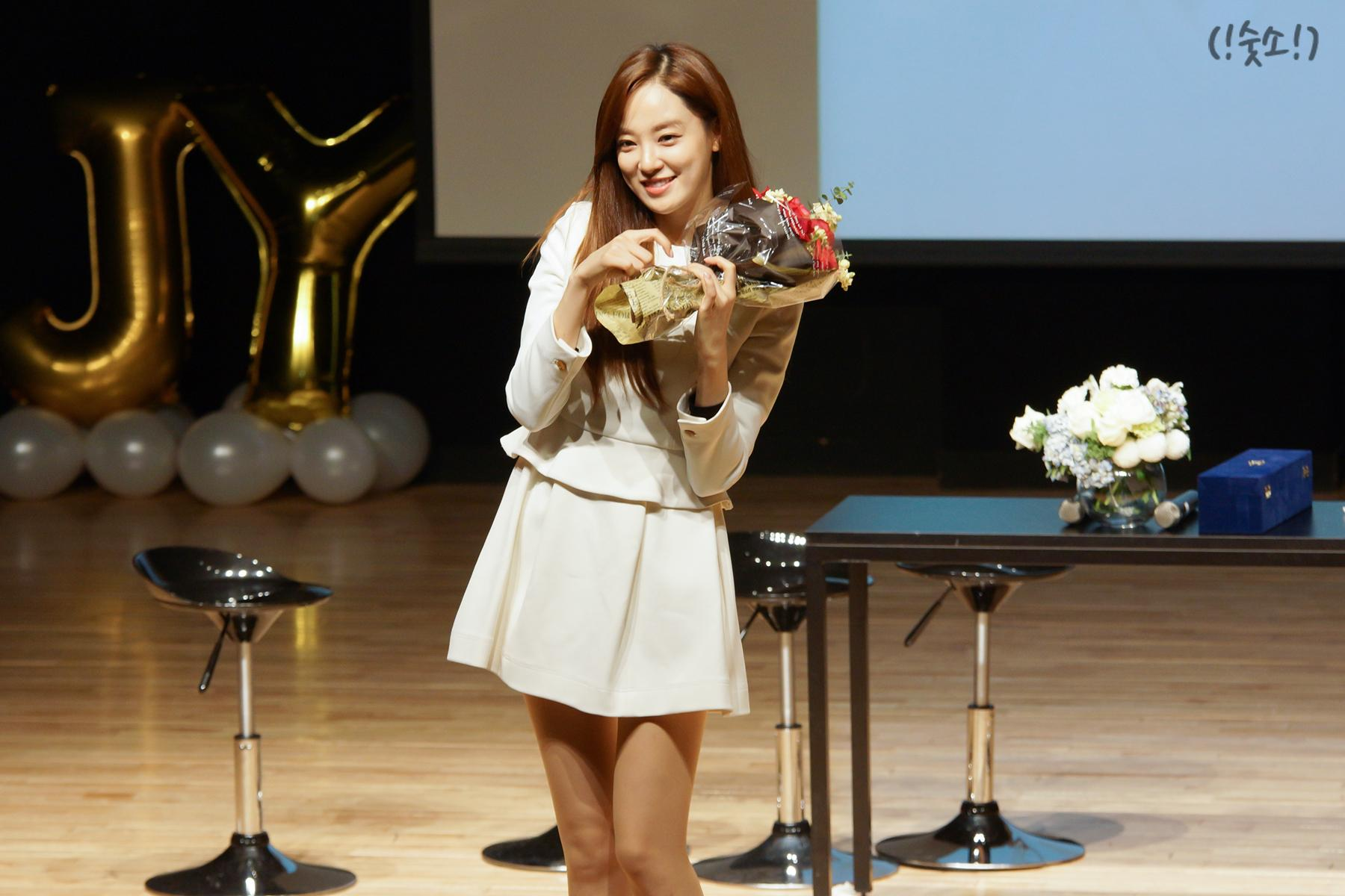 150111 애프터스쿨 주연 졸업식